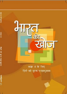 भारत की खोज